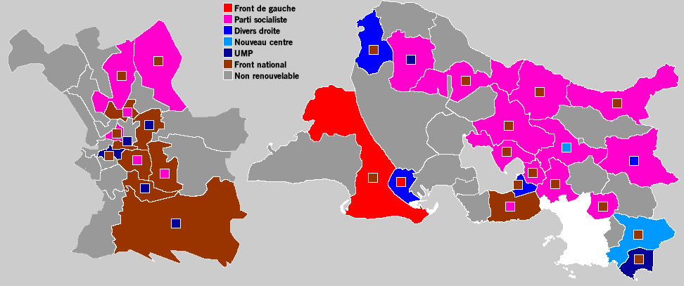 Parti arrivé en tête lors du premier tour des cantonales 2011 dans les Bouches-du-Rhône